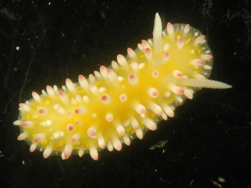 Cadlinella ornatissima, en isla Lizard, Australia